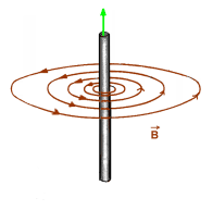 линии магнитной индукции